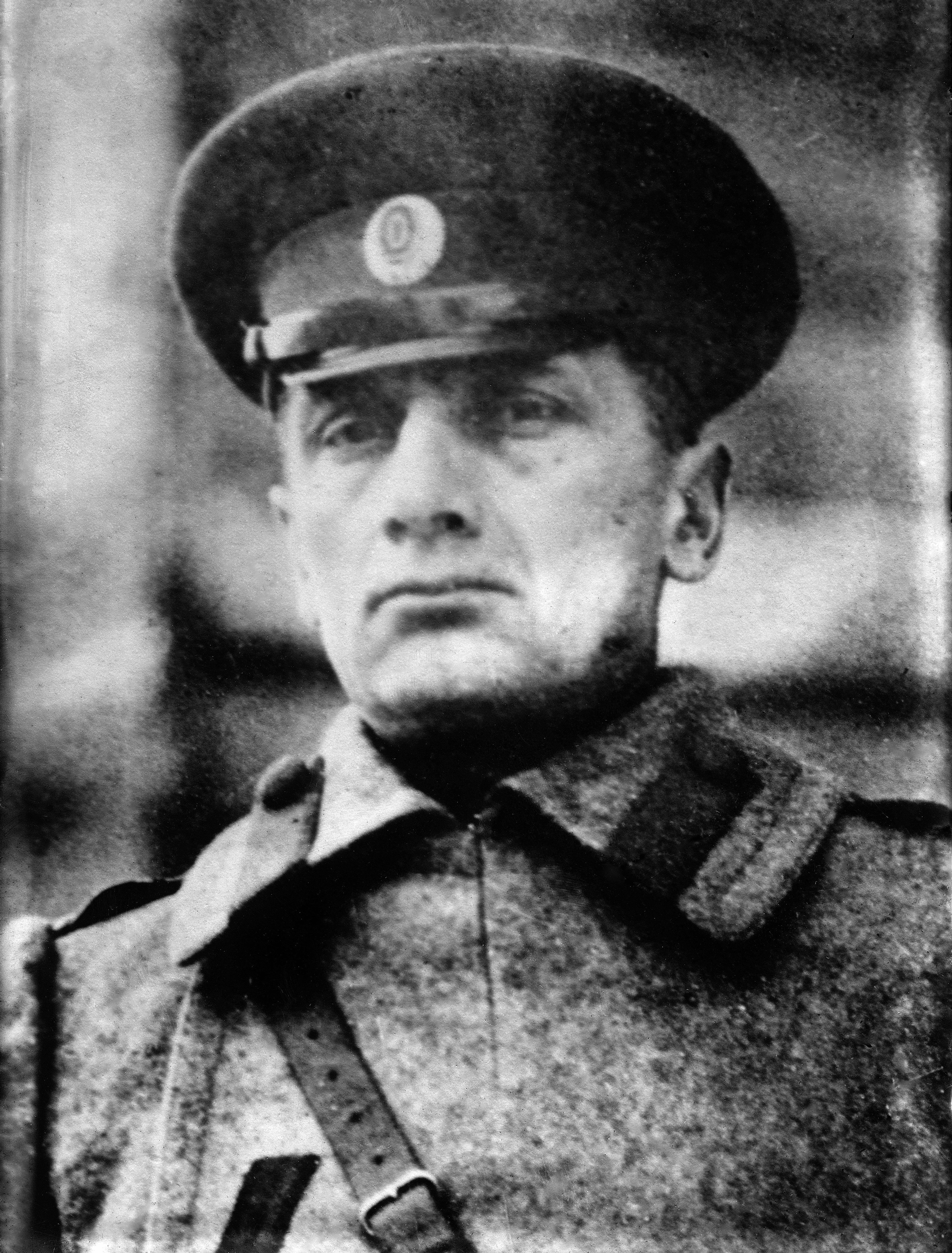 El almirante ruso Kolchak, caudillo supremo del gobierno antibolchevique siberiano.